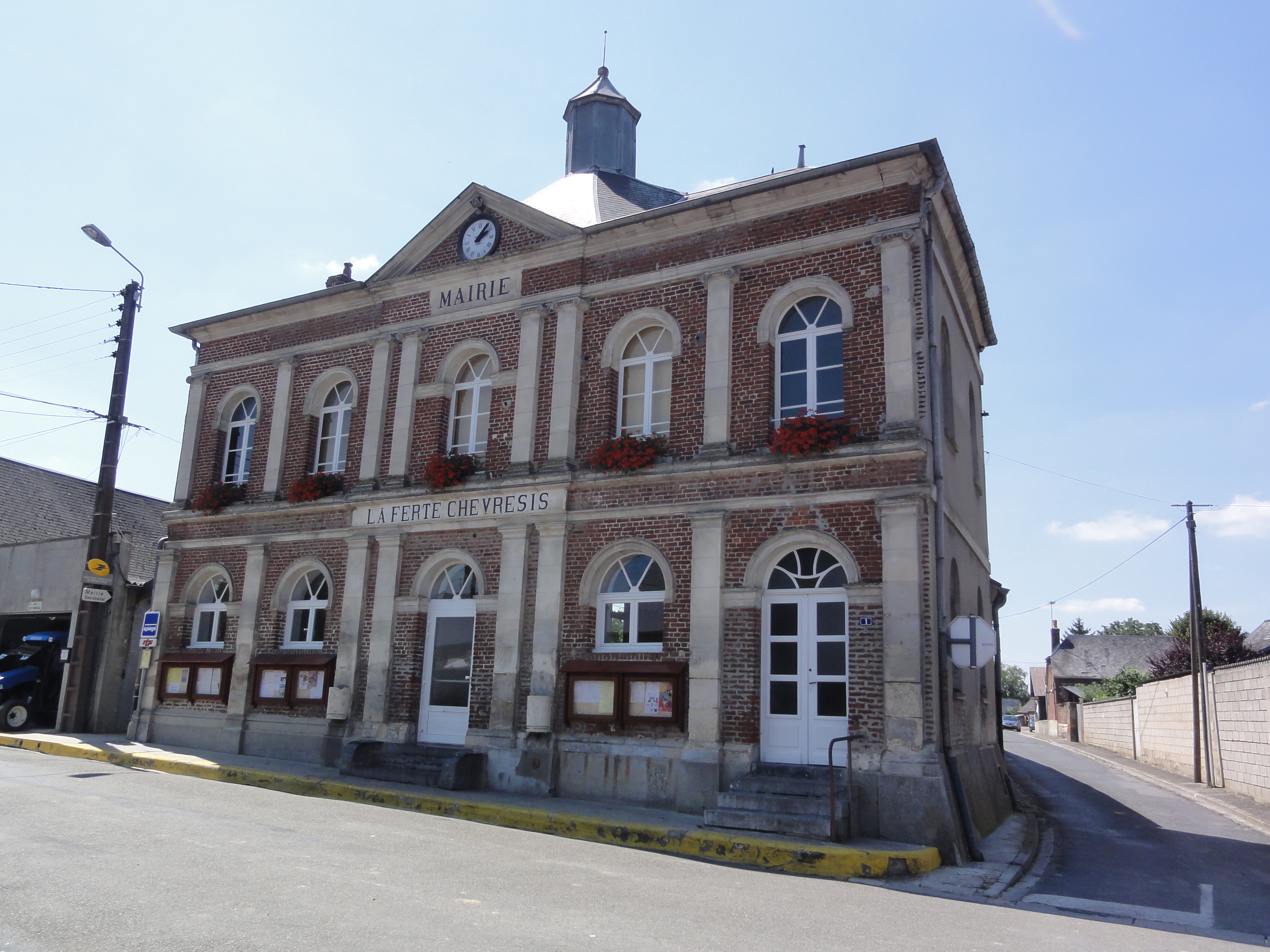 La Ferté-Chevresis (Aisne) mairie